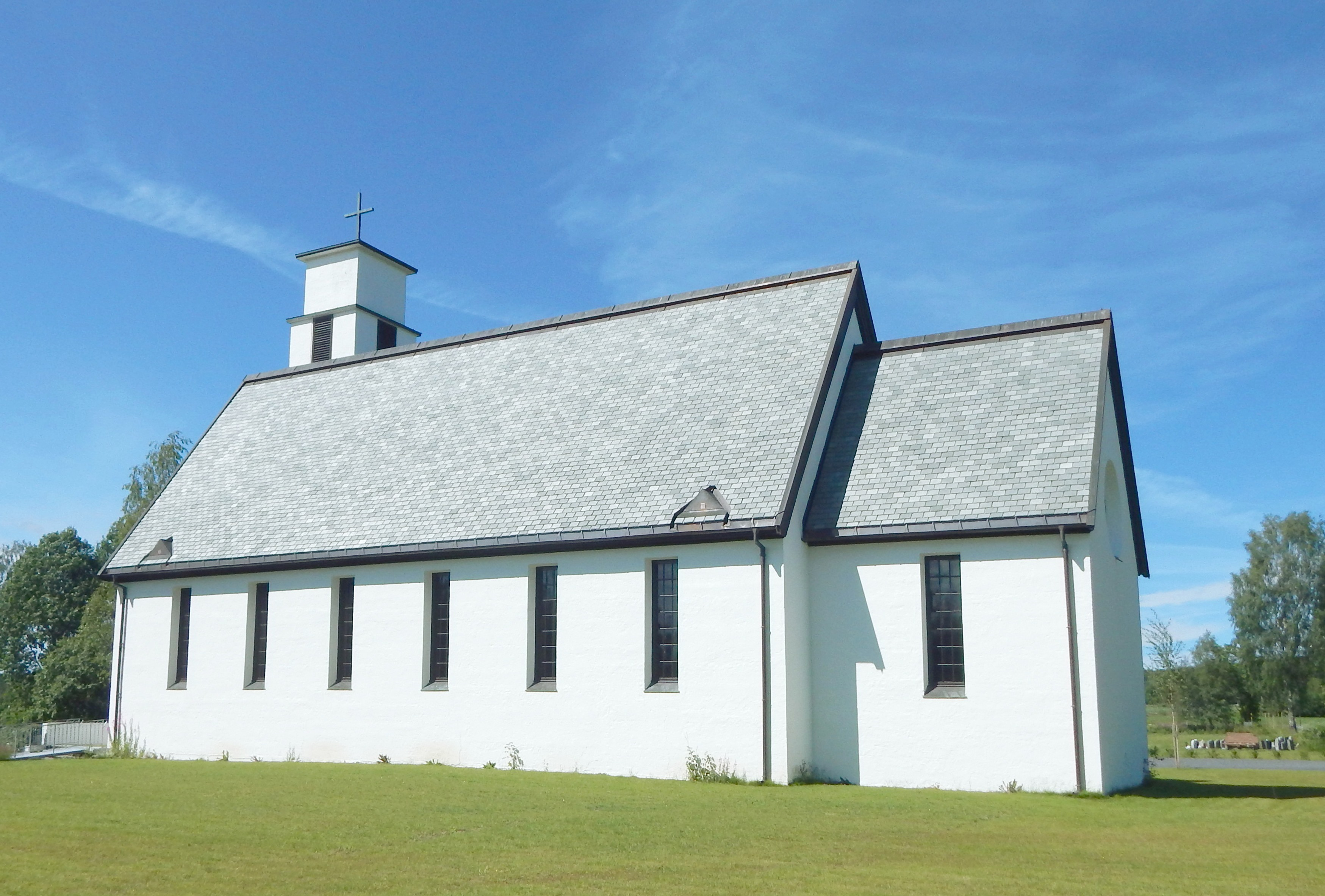 Hernes kirke